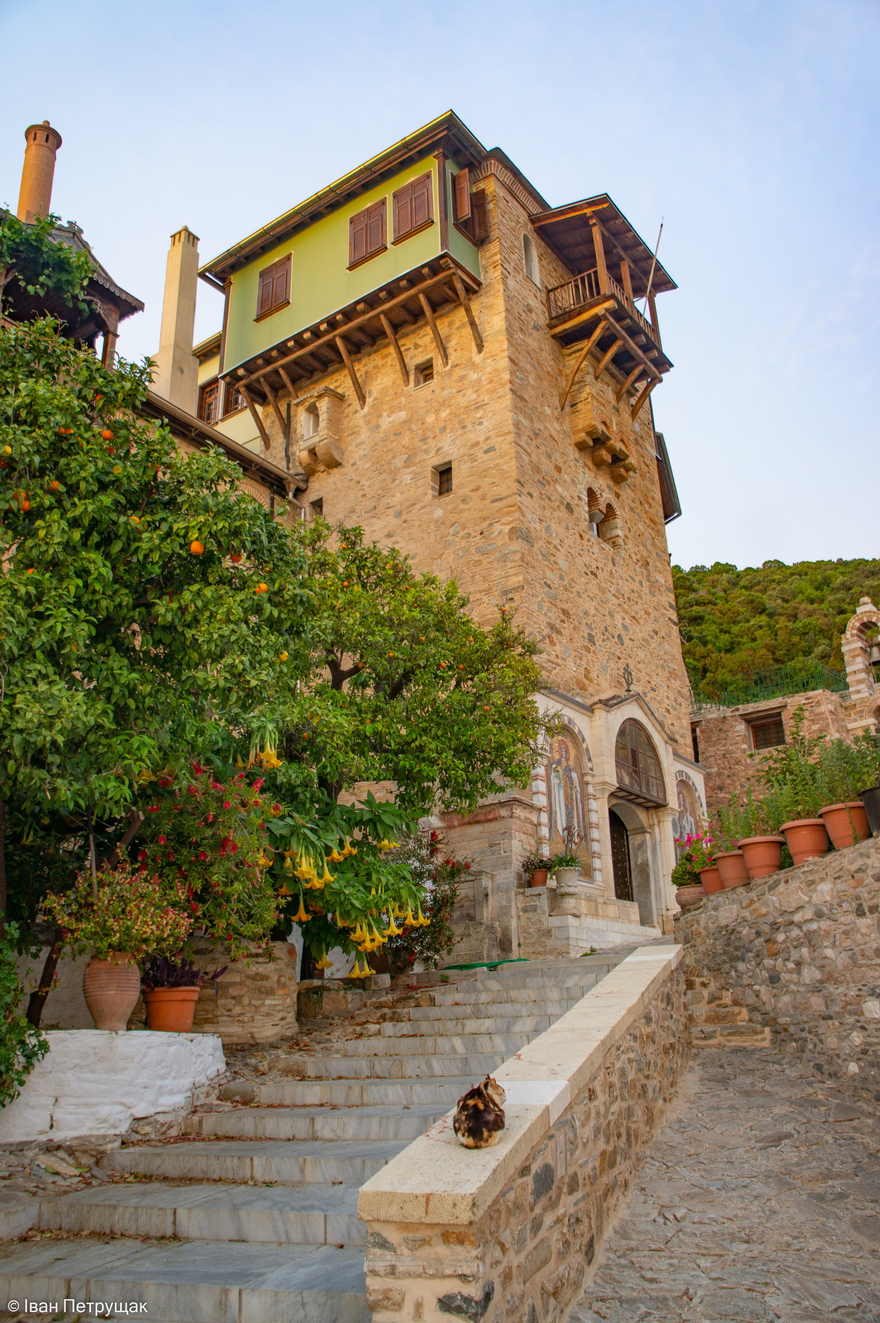 Ворота до монастиря. 2019 рік.